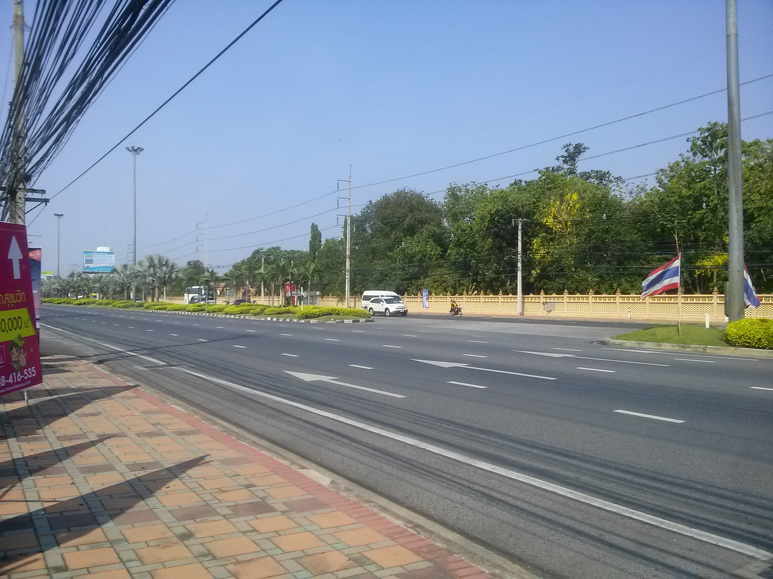 Na Kluea, Bang Lamung District, Chon Buri, Thailand